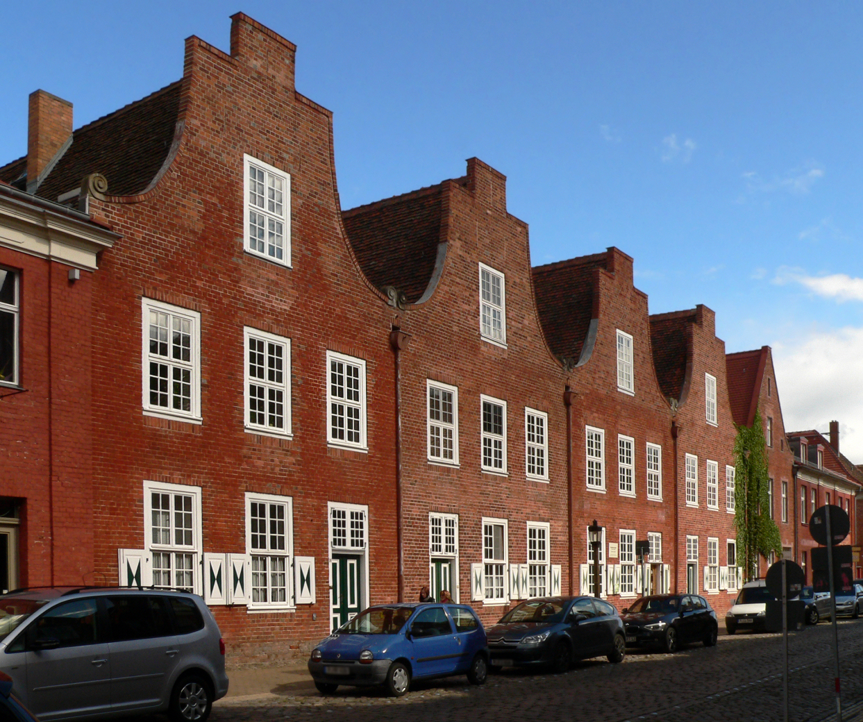 Holländisches Viertel Potsdam